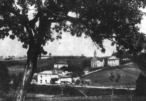 Vue générale de Lieudieu, Isère, France.